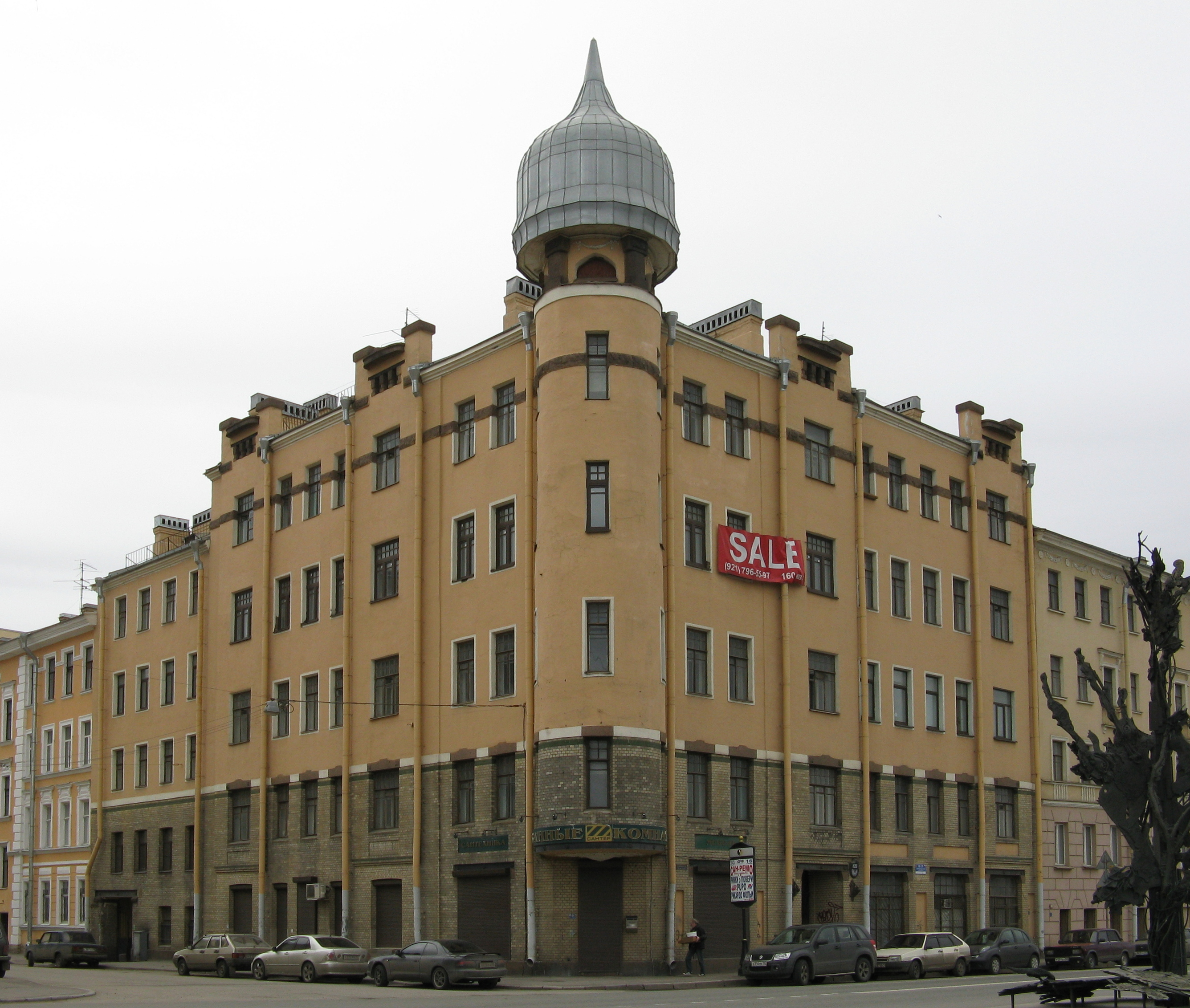 A corner of Petrogradskaya Embankment & Pinskiy Lane (St.-Petersburg)